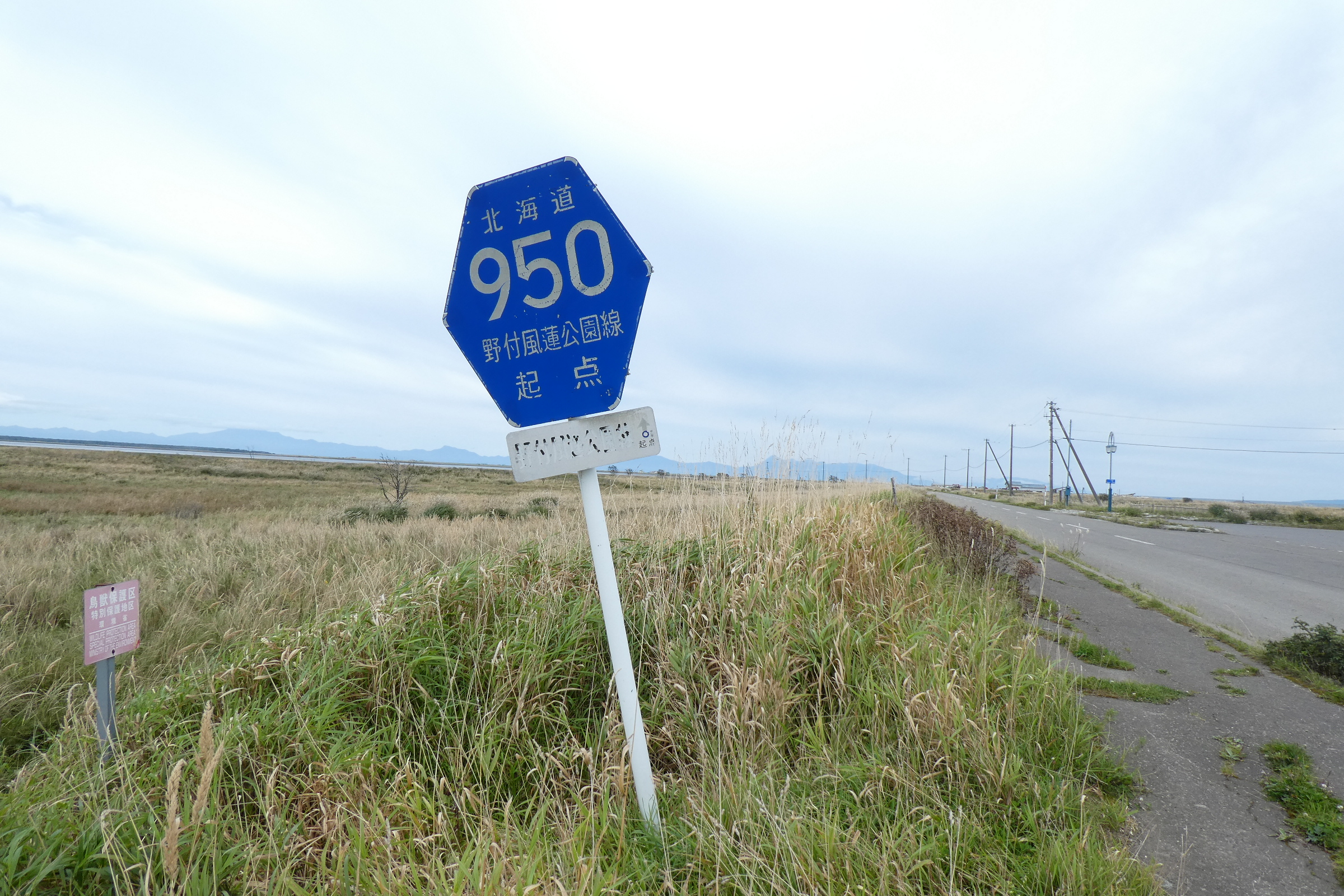 北海道道950号野付風蓮公園線の起点を示す標識